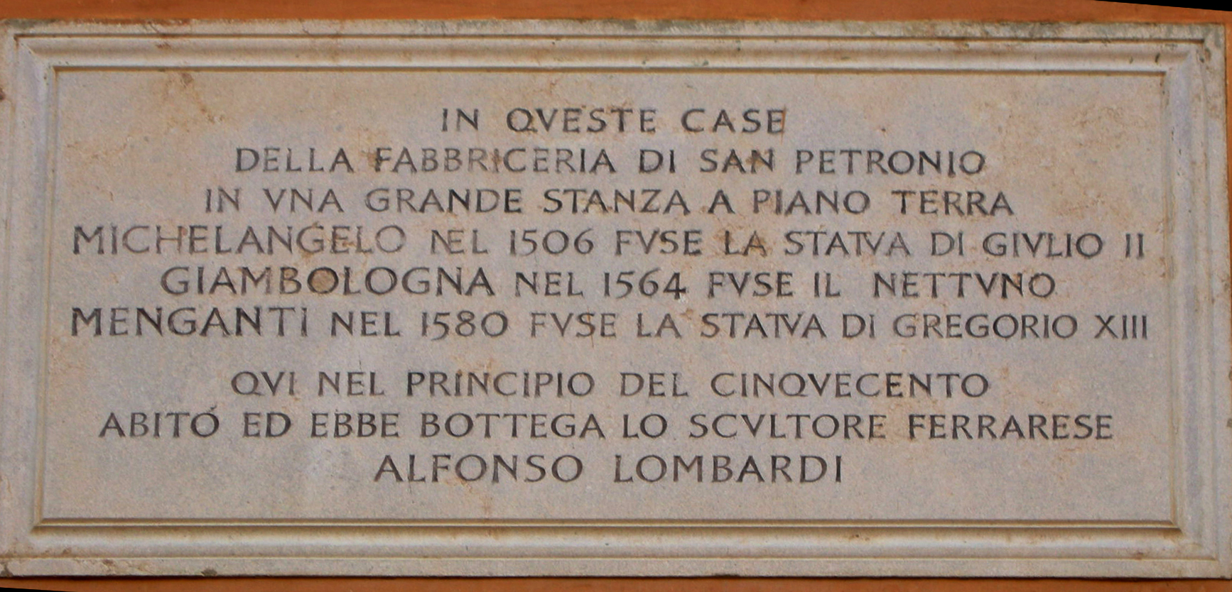 Bologna, targa piazza galvani